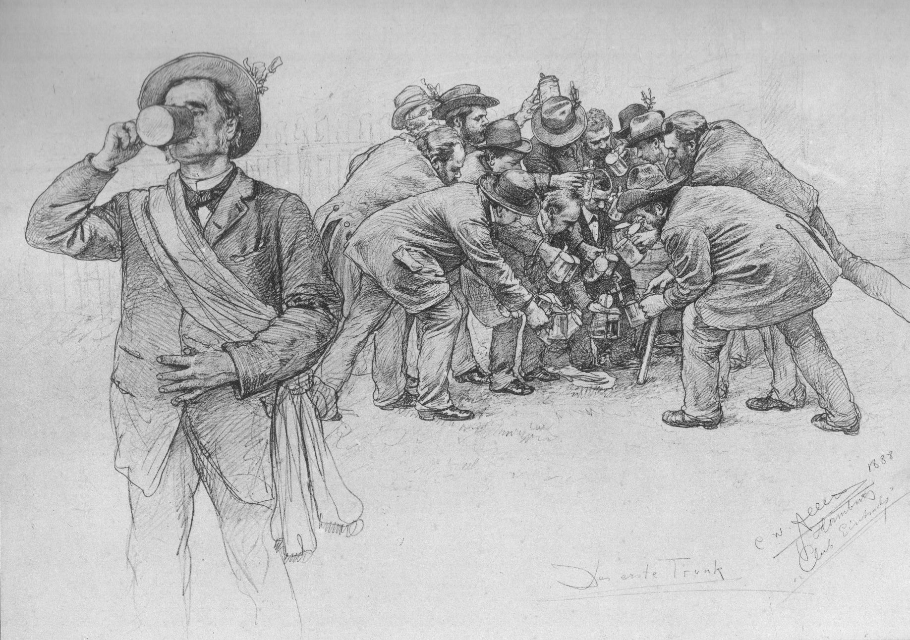 Männer, trinkend